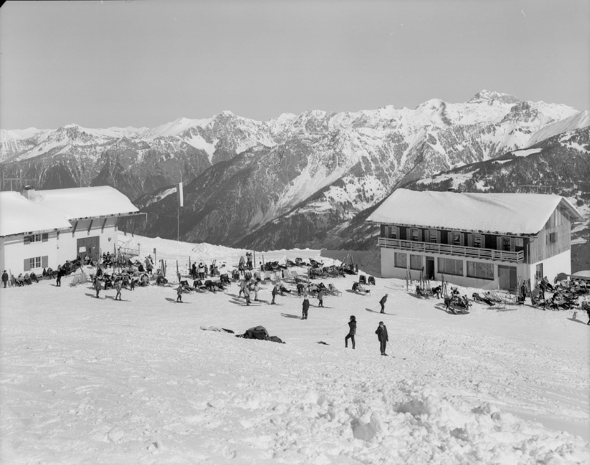 Golm Grüneck 2125 m im Montafon Berghof Golm und Bergstation Golmerbahn